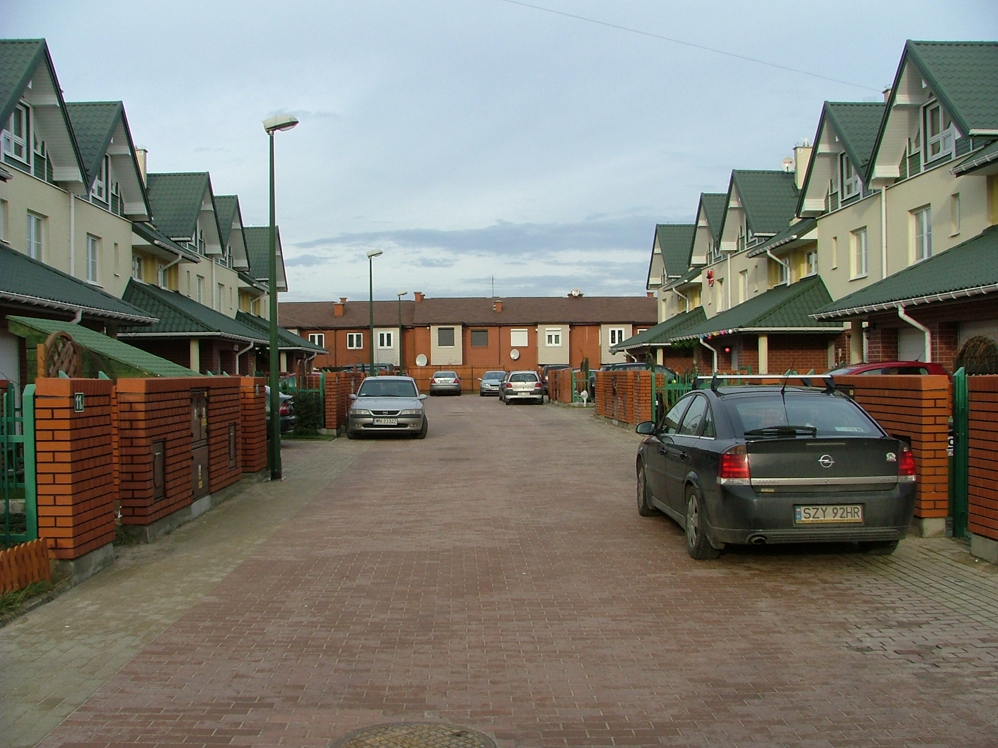 Mysiadło – wieś w Polsce położona w województwie mazowieckim, w powiecie piaseczyńskim, w gminie Lesznowola.